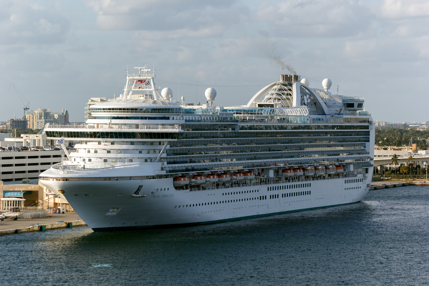 Docked at Pier 2 in Port Everglades